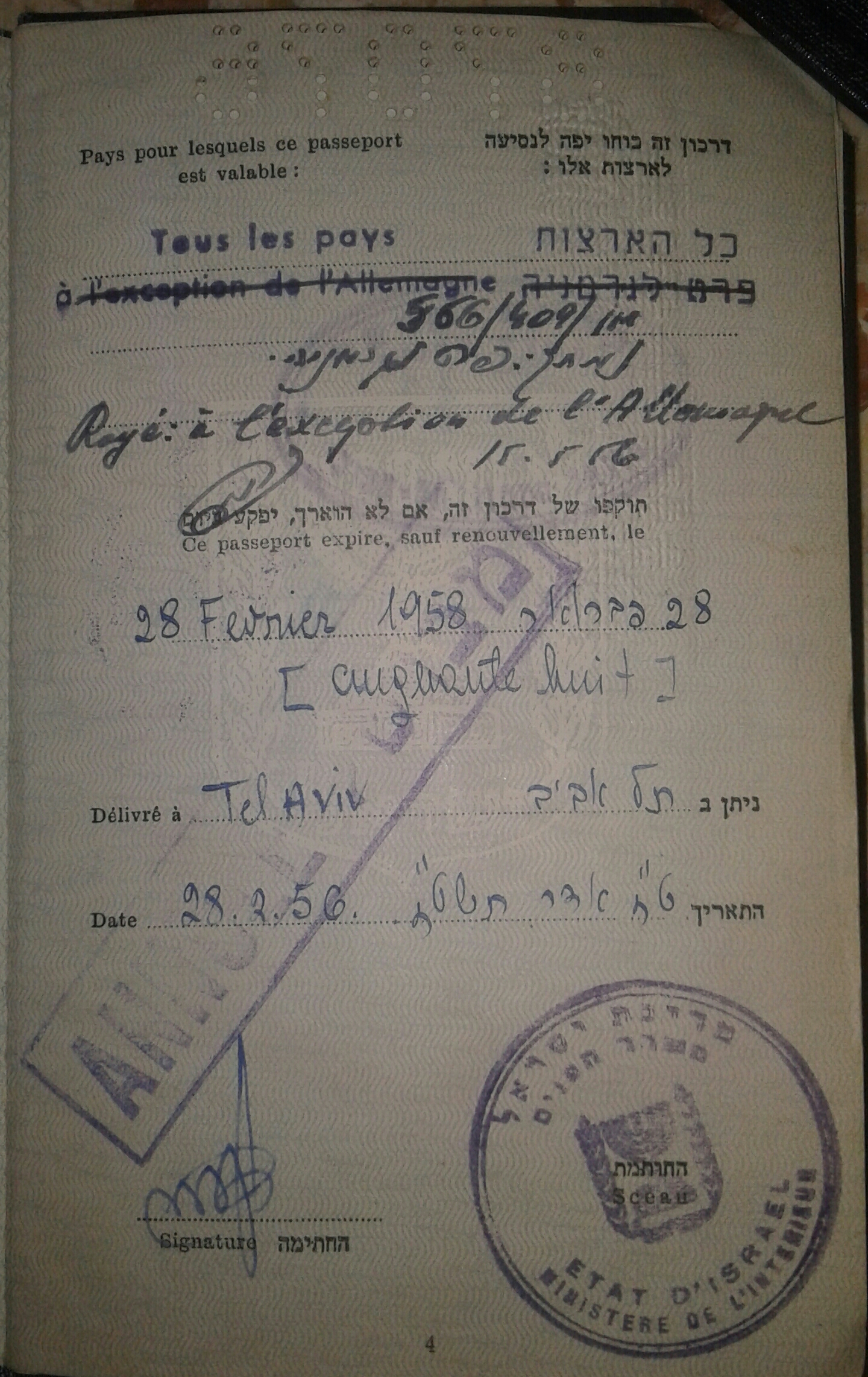 חותמת בדרכון ישראלי המציינת שכוחו יפה לכל הארצות מלבד גרמניה עד 1956